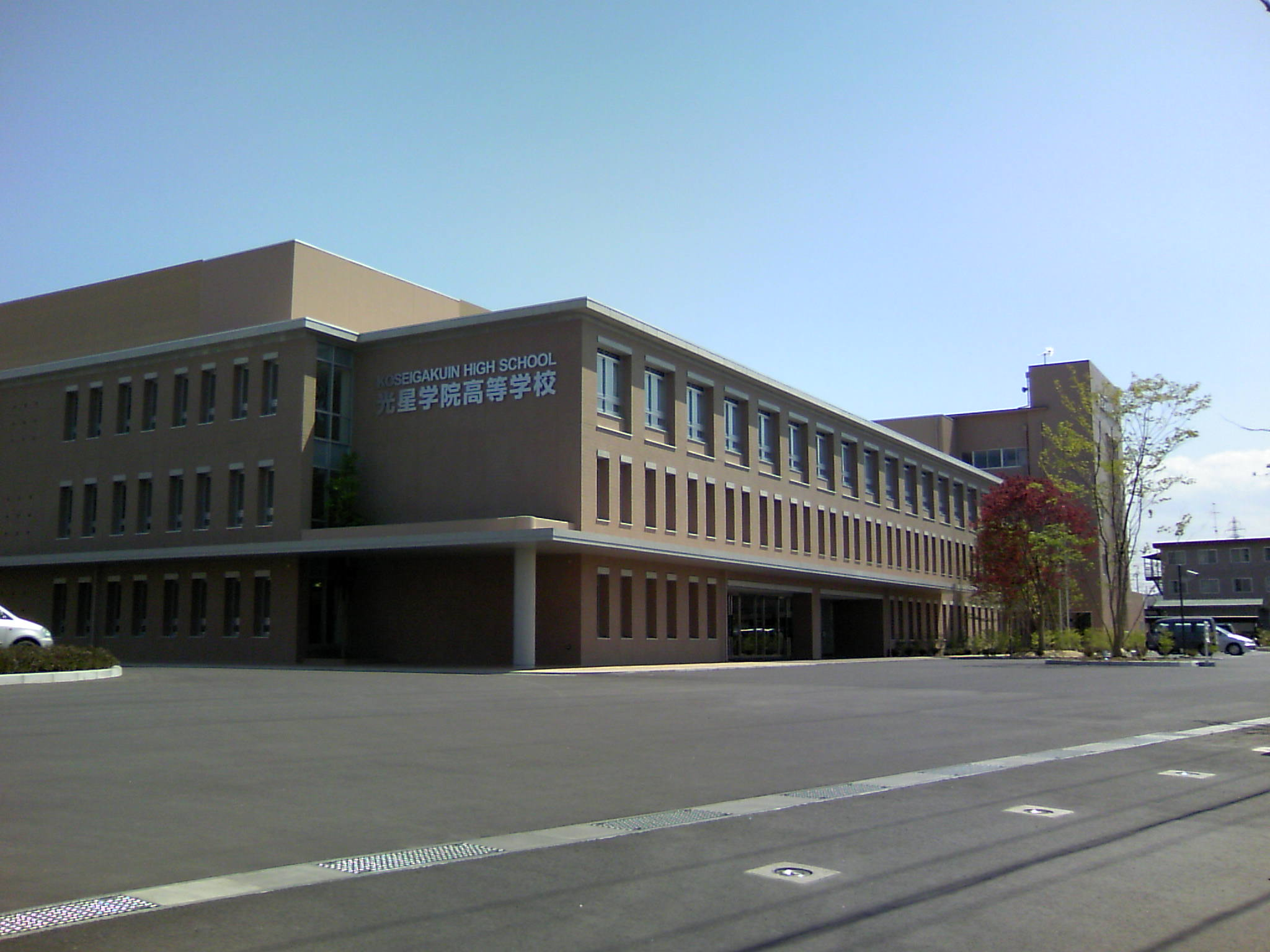 私立光星学院高等学校（青森県八戸市） (KouseiGakuin Highschool - HACHINOHE, AOMORI, JAPAN)